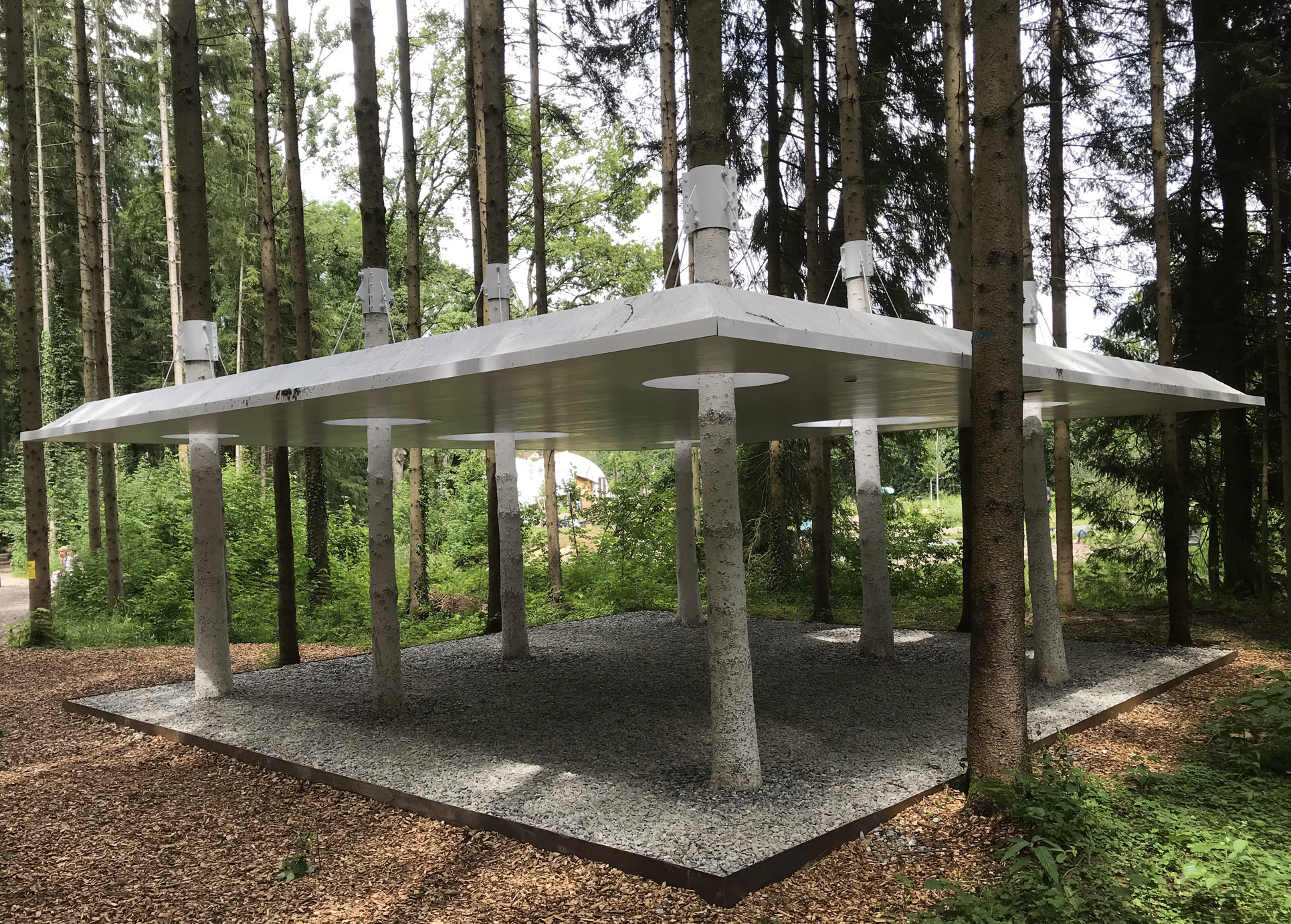 Böbingen (Rems) - Weißes Dach. Die Installation entstand als Station 3 der „16 Stationen“ der Remstalgartenschau 2019.